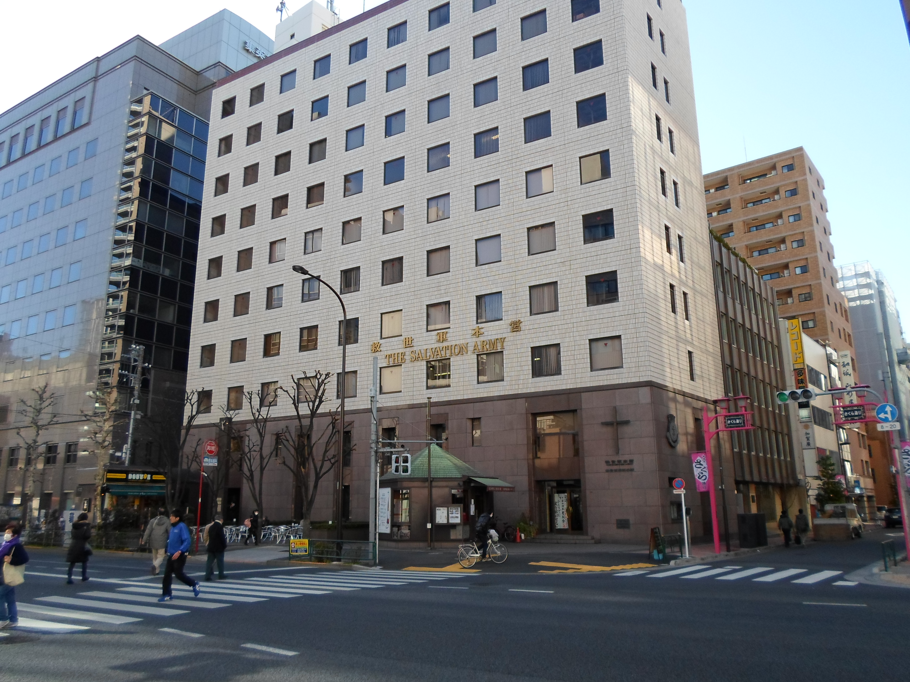 救世軍日本本営、東京神田神保町